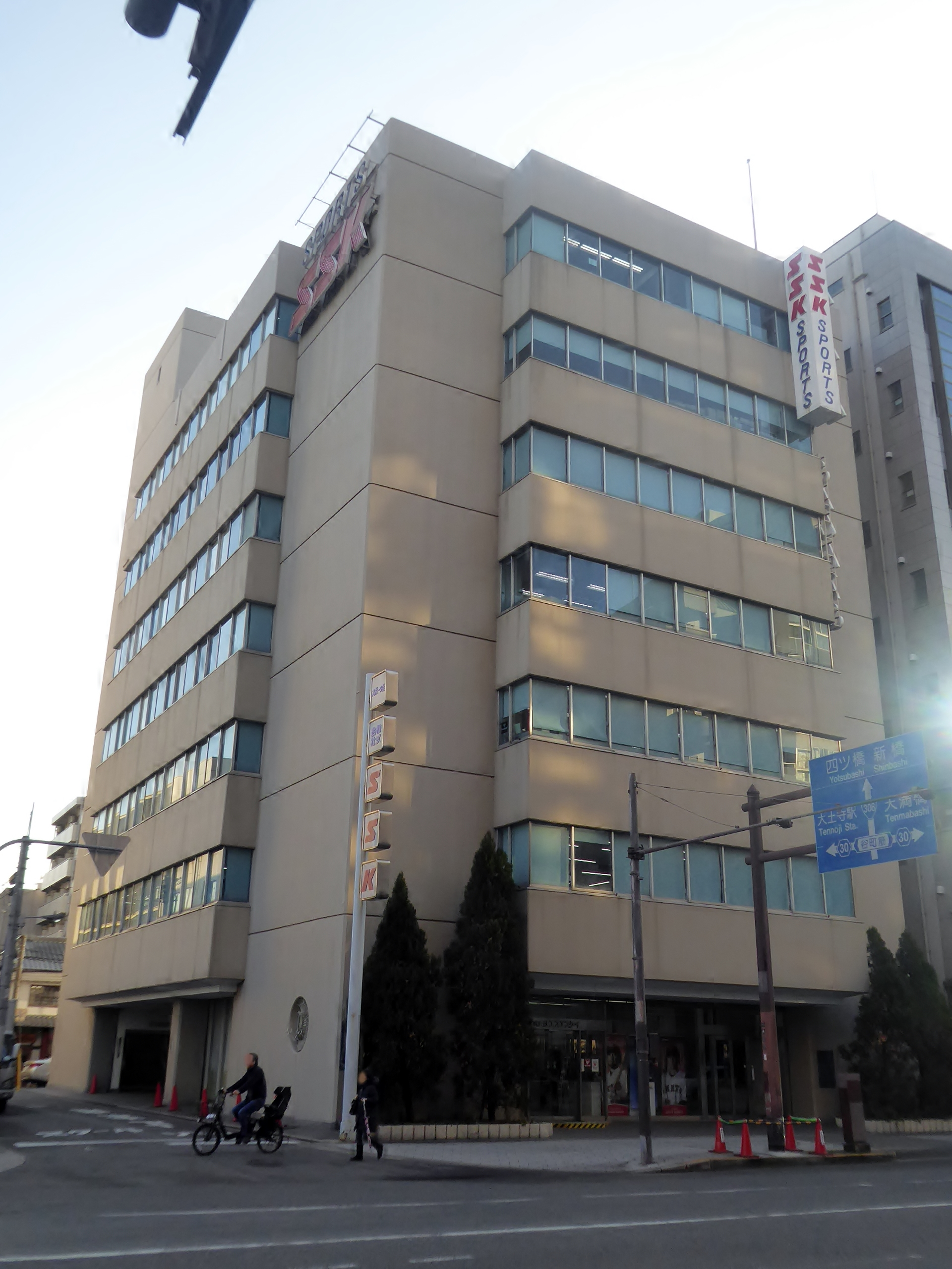 株式会社エスエスケイ本社を撮影。 Panasonic Lumix DMC-TZ60